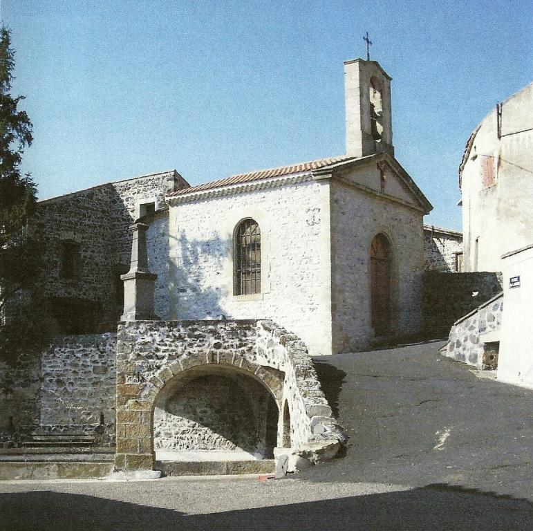 La Chapelle de Lavelle et les voutes du lavoir